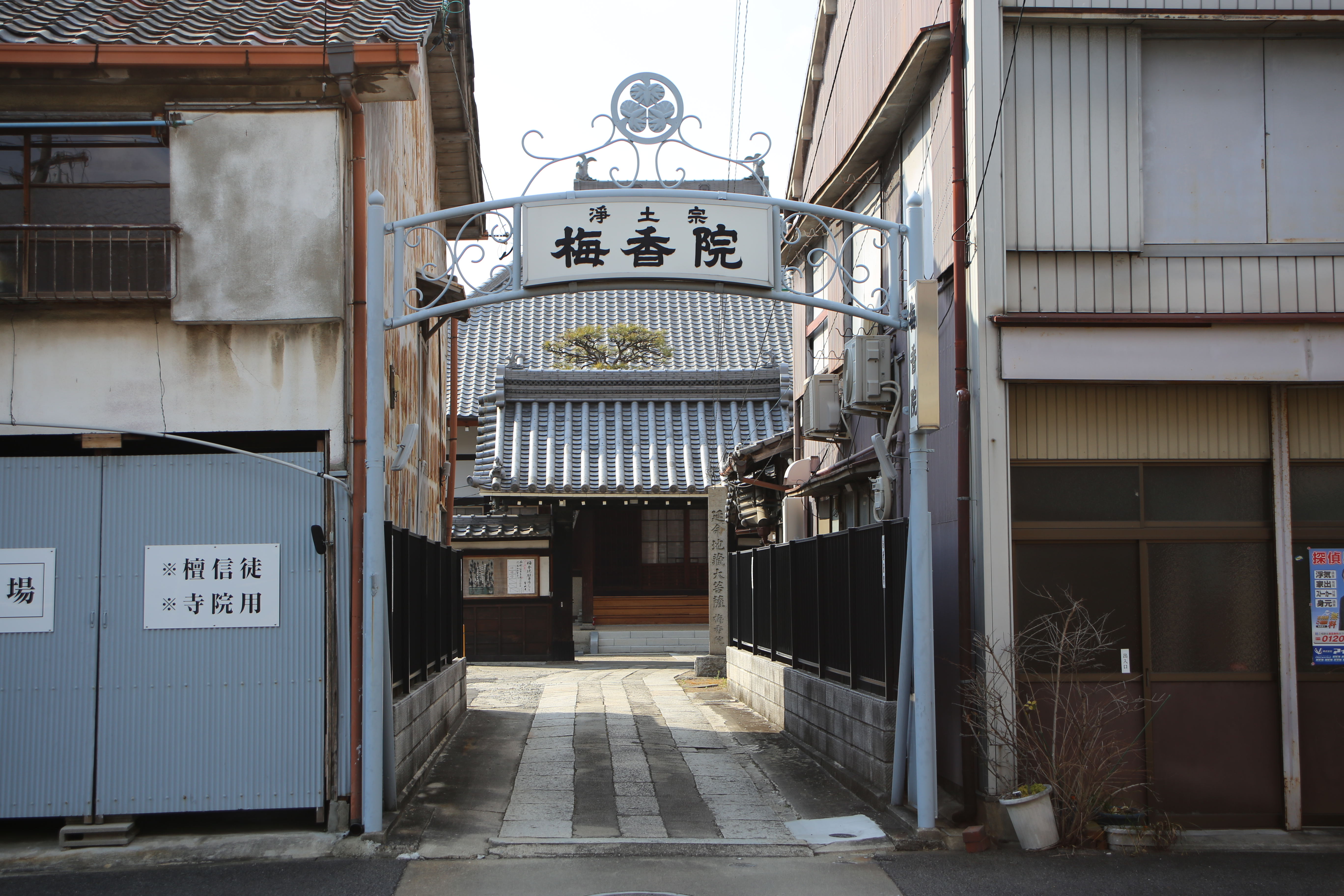 名古屋市中区橘の梅香院